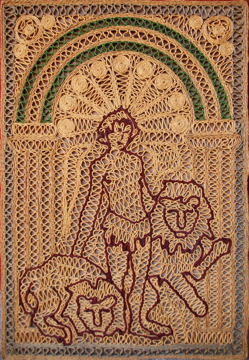 Montada sobre tablero 100 x 150 cm. Realizada en el taller de espartería de la Escuela de Arte Casa de las Torres de Úbeda.